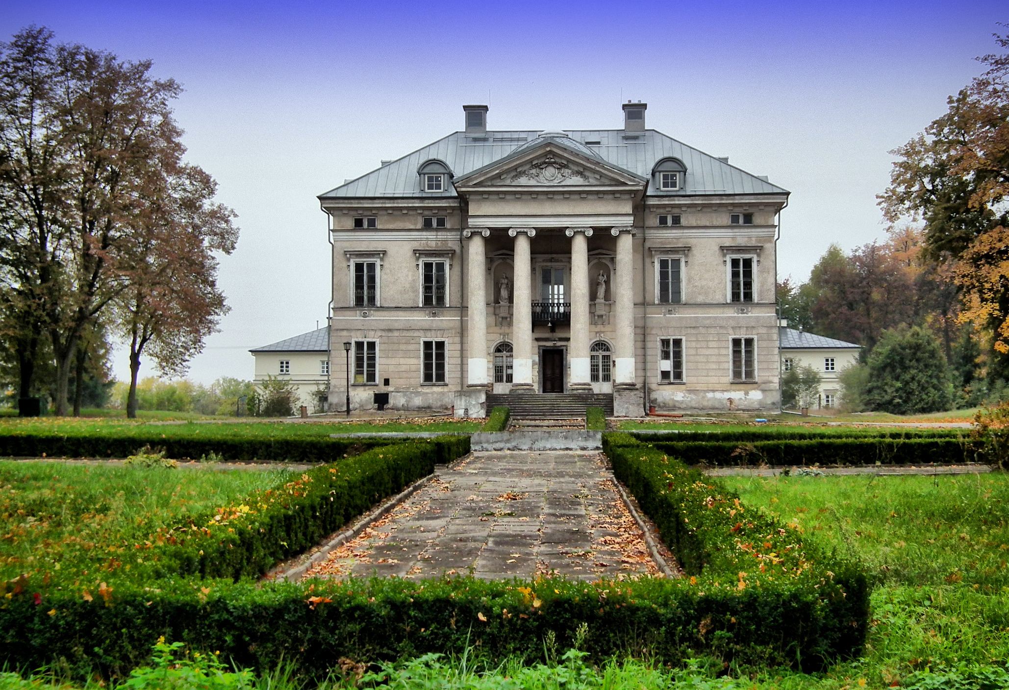 Pałac w Niezdowie, w latach 1785-1787 zbudowany przez Aleksandra Lubomirskiego, projektował architekt Lubomirskich Franciszek Degen. Do początku lat dwudziestych XX wieku pałac należał do rodziny Kleniewskich, ostatnim właścicielem był zakon Sióstr Służek N.M.P.